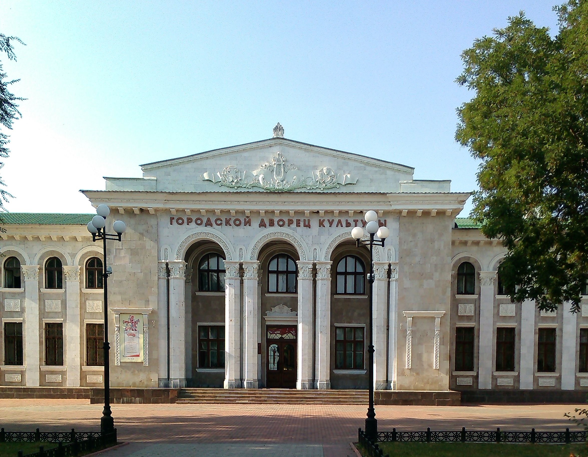 Kulturpalast in Tiraspol